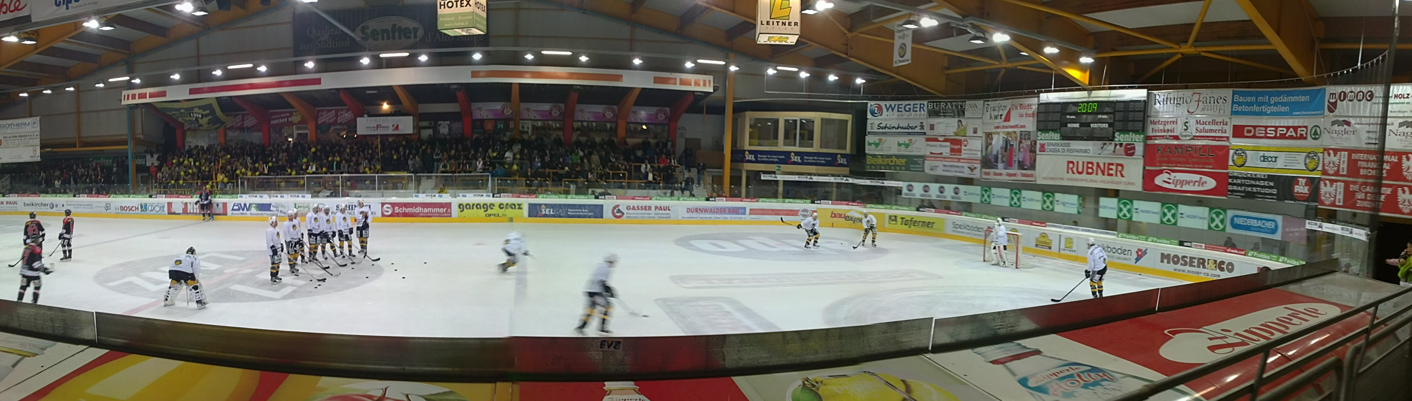 Leitner Solar Arena Bruneck am 24. September 2011 Aufwärmphase für das erste Meisterschaftsspiel Fiat Professional Wölfe - HC Valpellice. Blick von der Südtribüne auf die Nordtribüne.